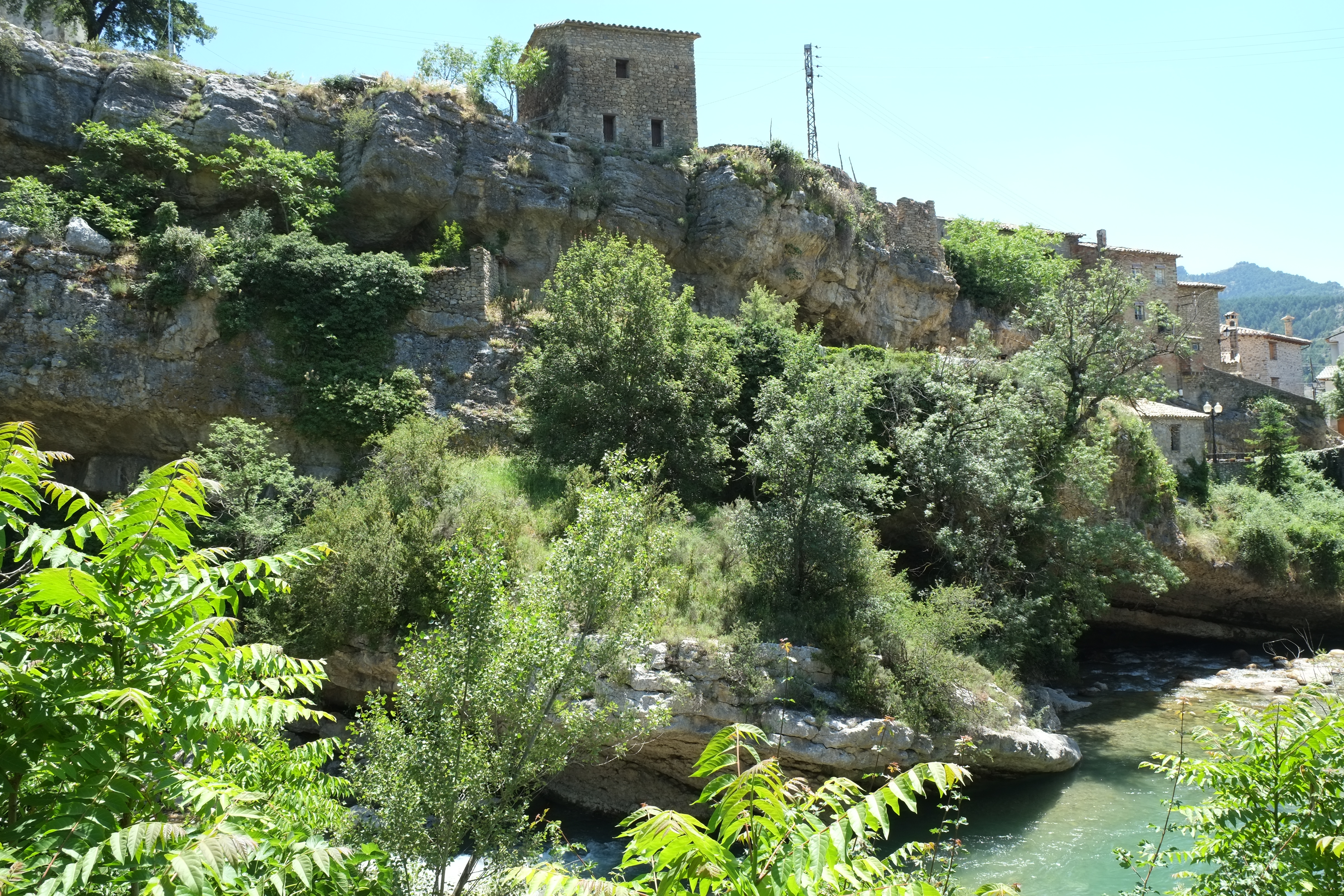 Serraduy in Aragonien (Spanien)